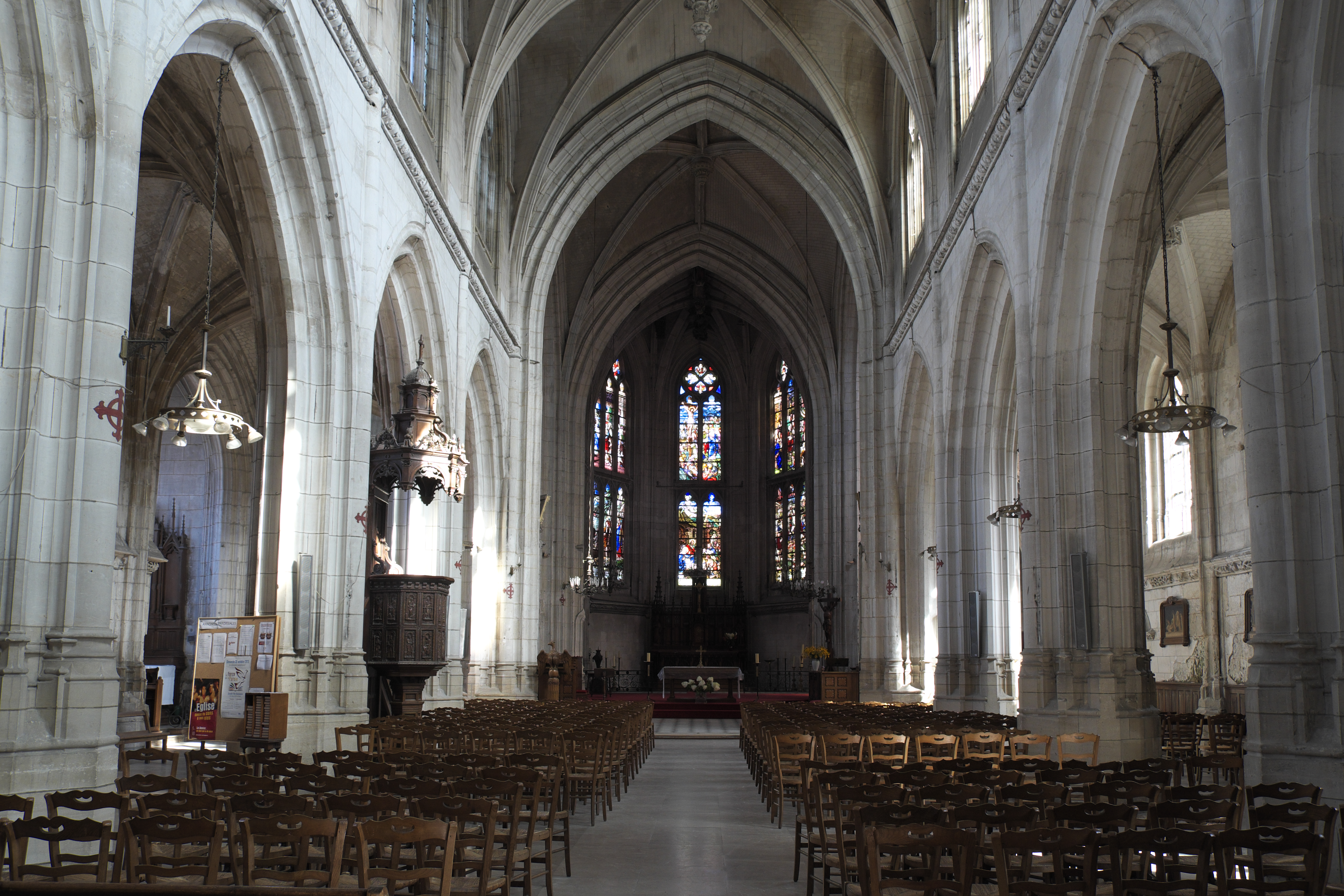 Katholische Kirche Saint-Pierre und Saint-Paul in Aumale im Département Seine-Maritime (Haute-Normandie/Frankreich), Innenraum mit Blick zum Chor